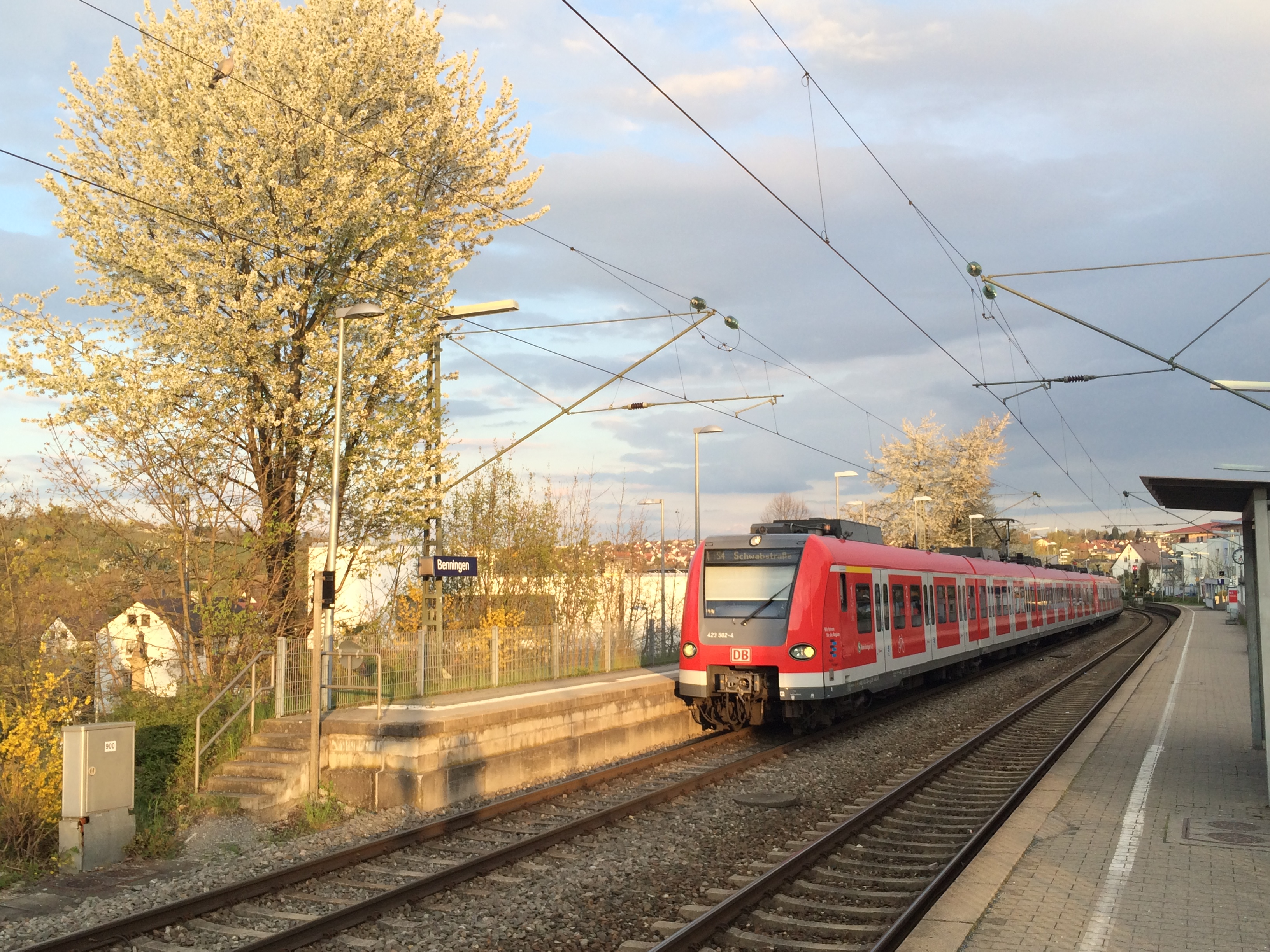 Bahnhof Benningen am Neckar mit S-Bahn in Fahrtrichtung Stuttgart